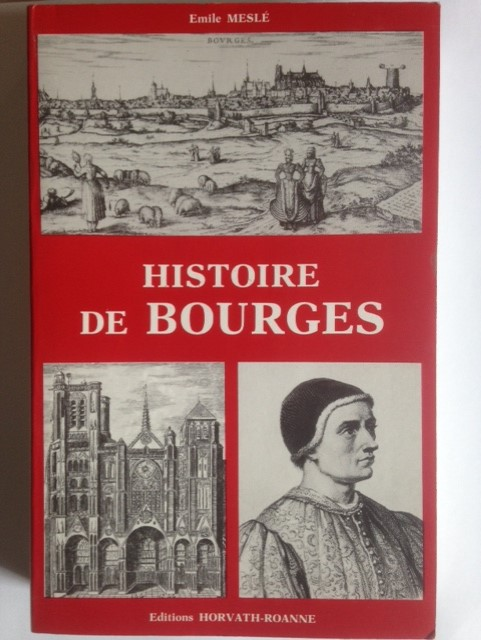 Histoire de Bourges - By Emile Meslé - Horvath Roanne edition - 1984